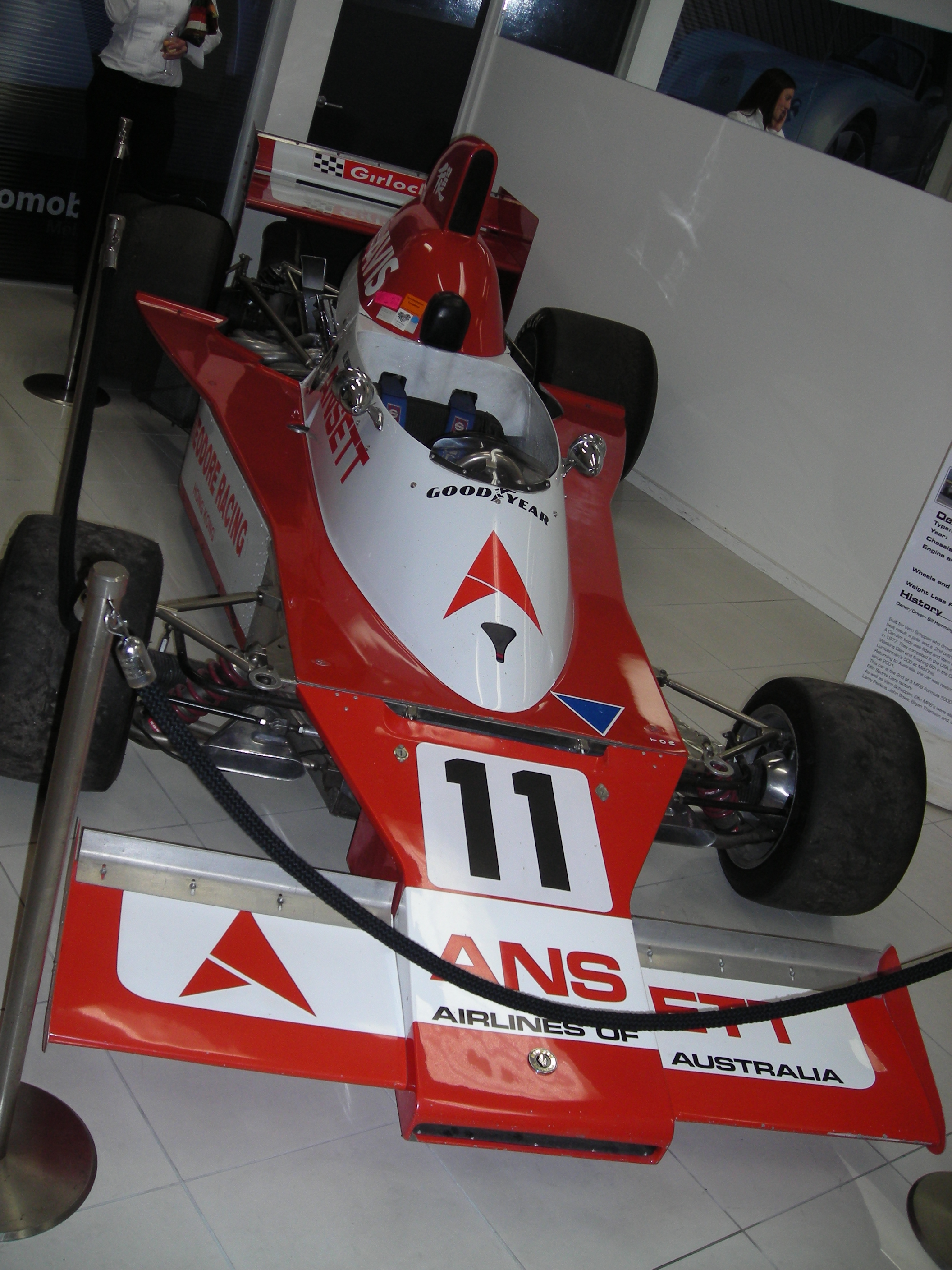 Elfin MR8 formula carDSCN0614